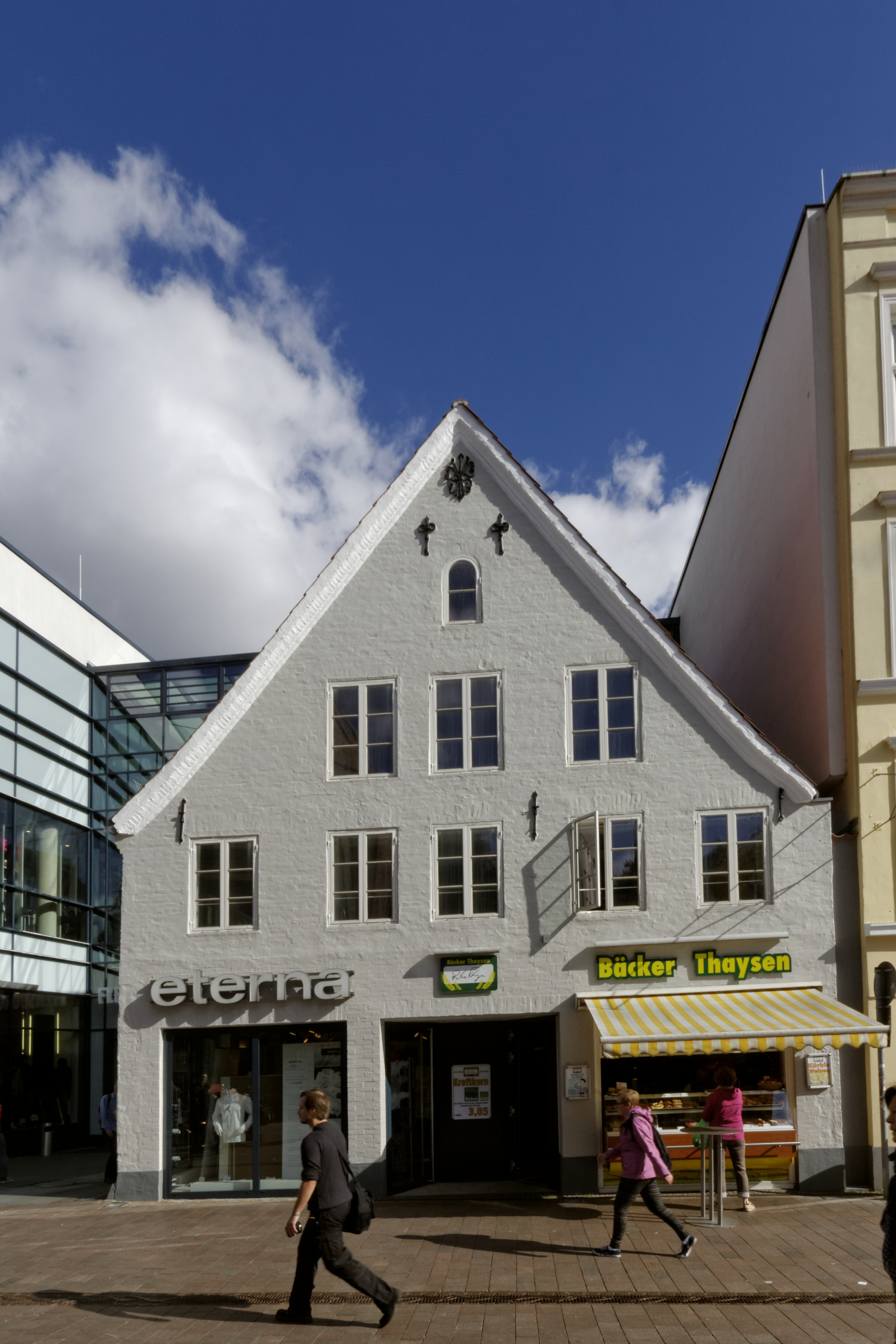 Flensburg, Steinbach-Haus, Holm 59; Kaufmannshof Vorderseite